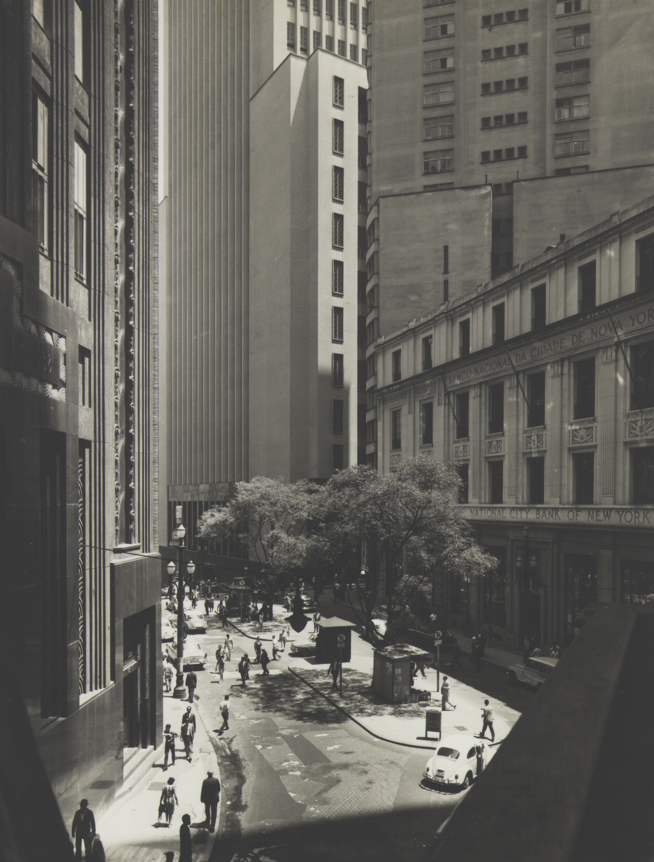 Obra que integra o acervo do Museu Paulista da USP. Coleção Werner Haberkorn